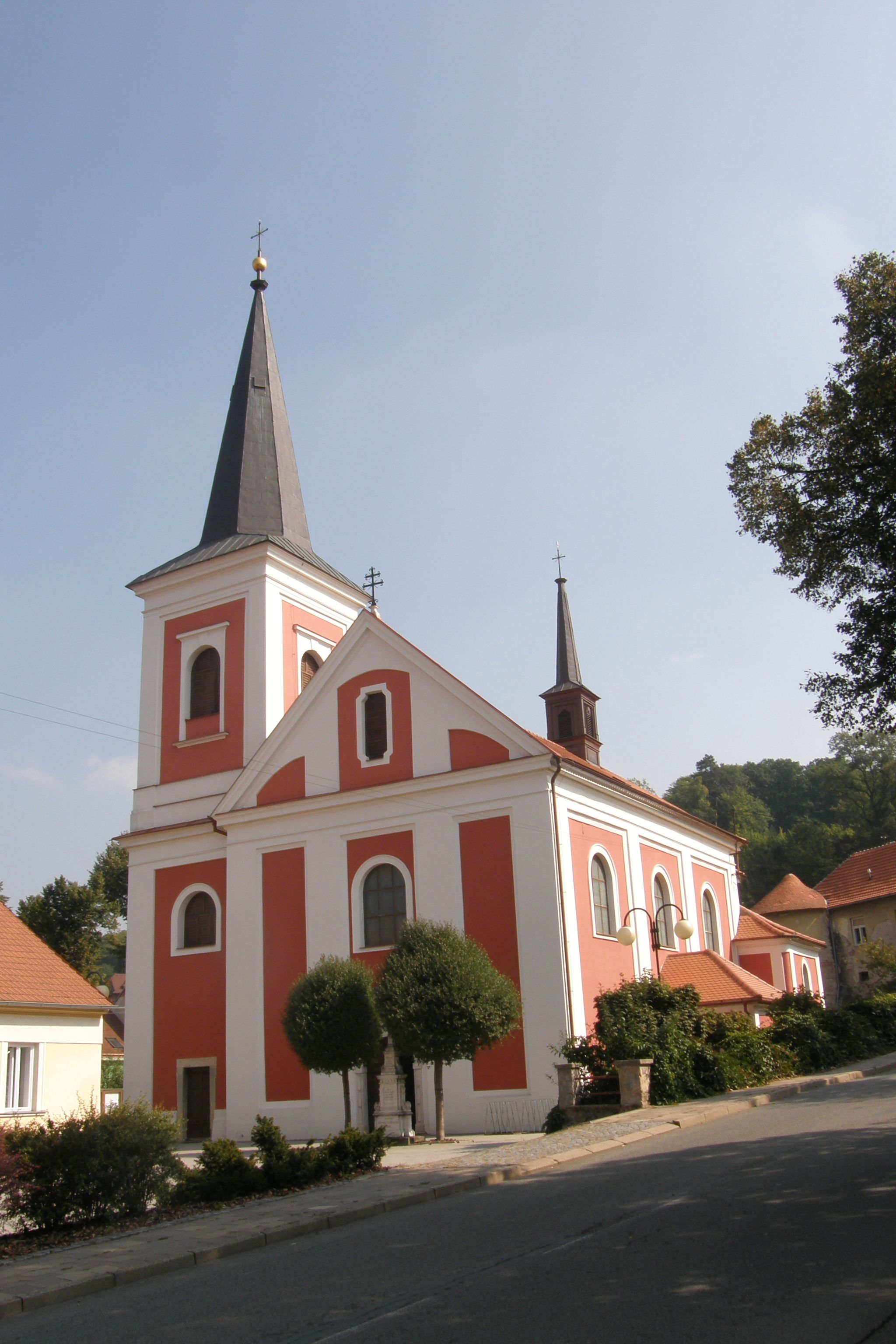 Kostel Všech svatých (Rájec), Blanenská, Rájec